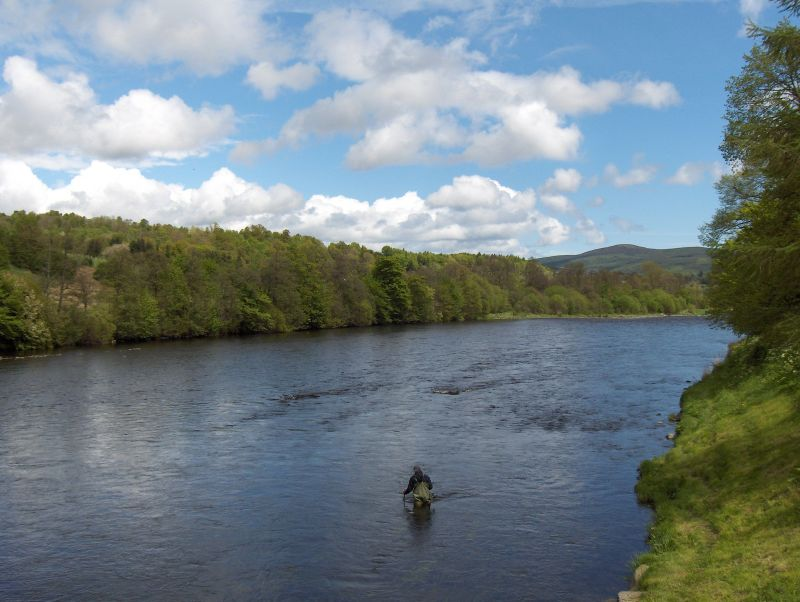 River Spey